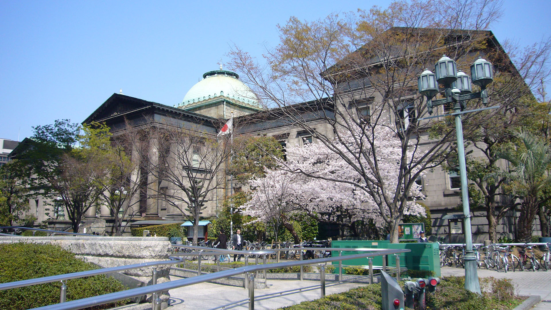 Osaka Prefectural Nakanoshima Library in Osaka, Japan